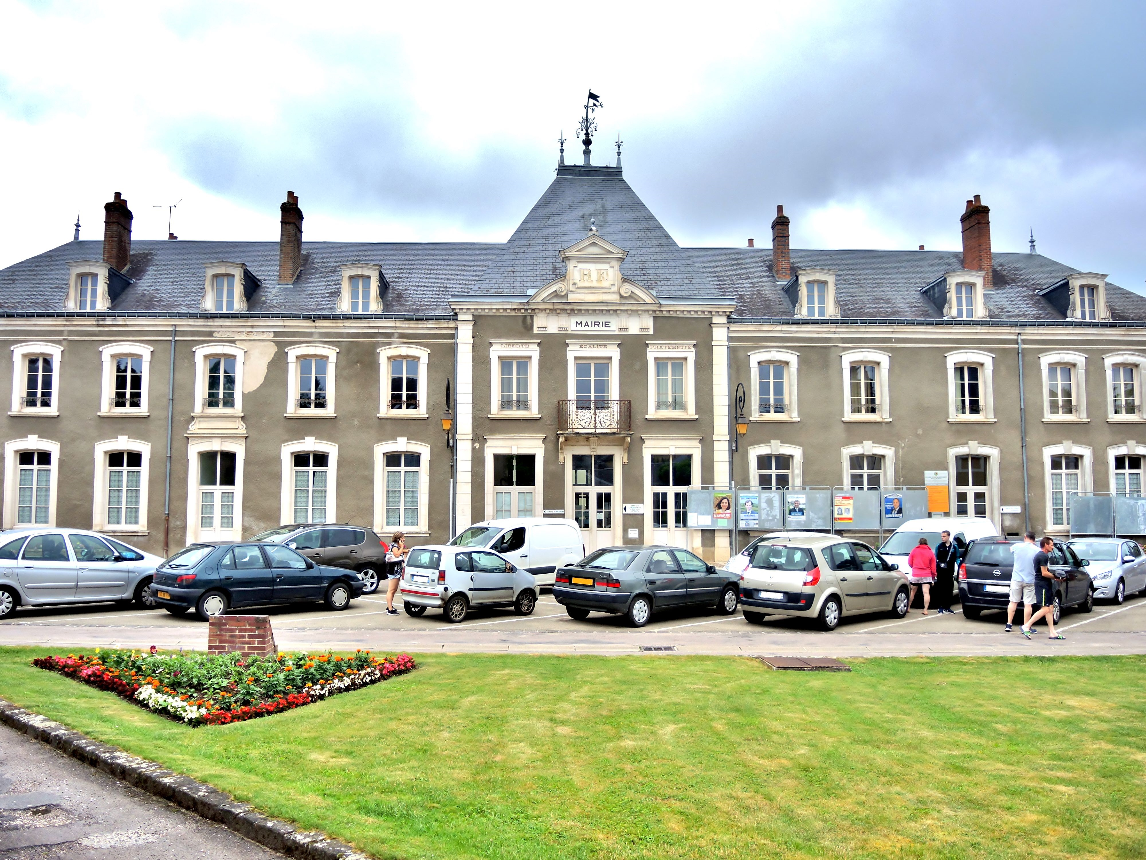 Mairie de Saint-Fargeau. Ancien couvent des Augustins. Yonne.